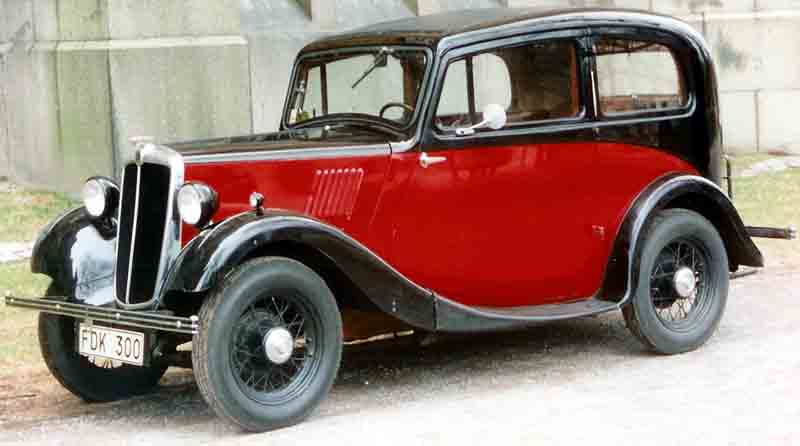 Morris Eight 2-Door Saloon 1936